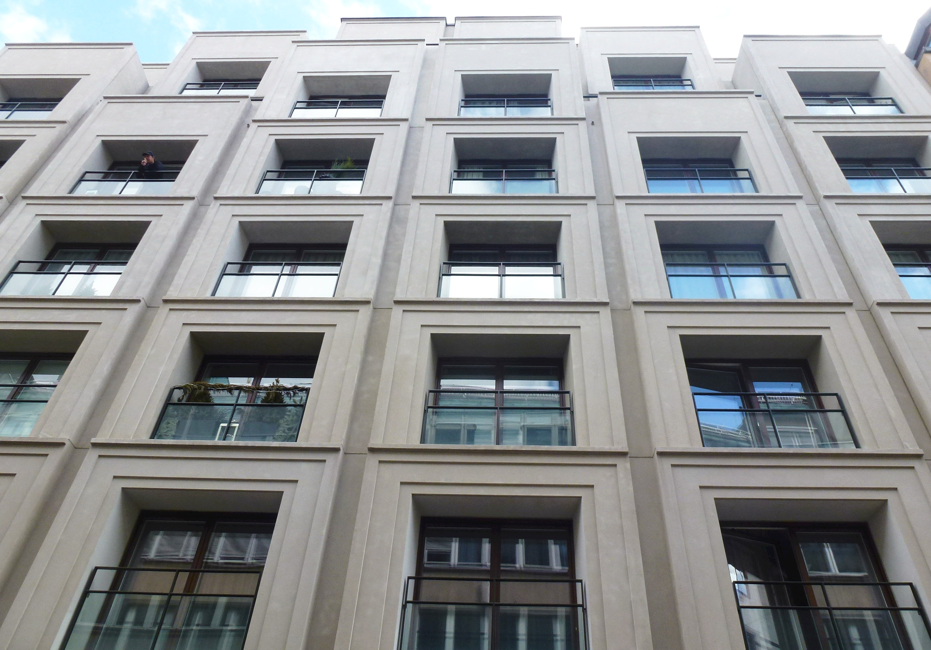 Grev Turegatan 8, nominerad till Årets Stockholmsbyggnad 2015